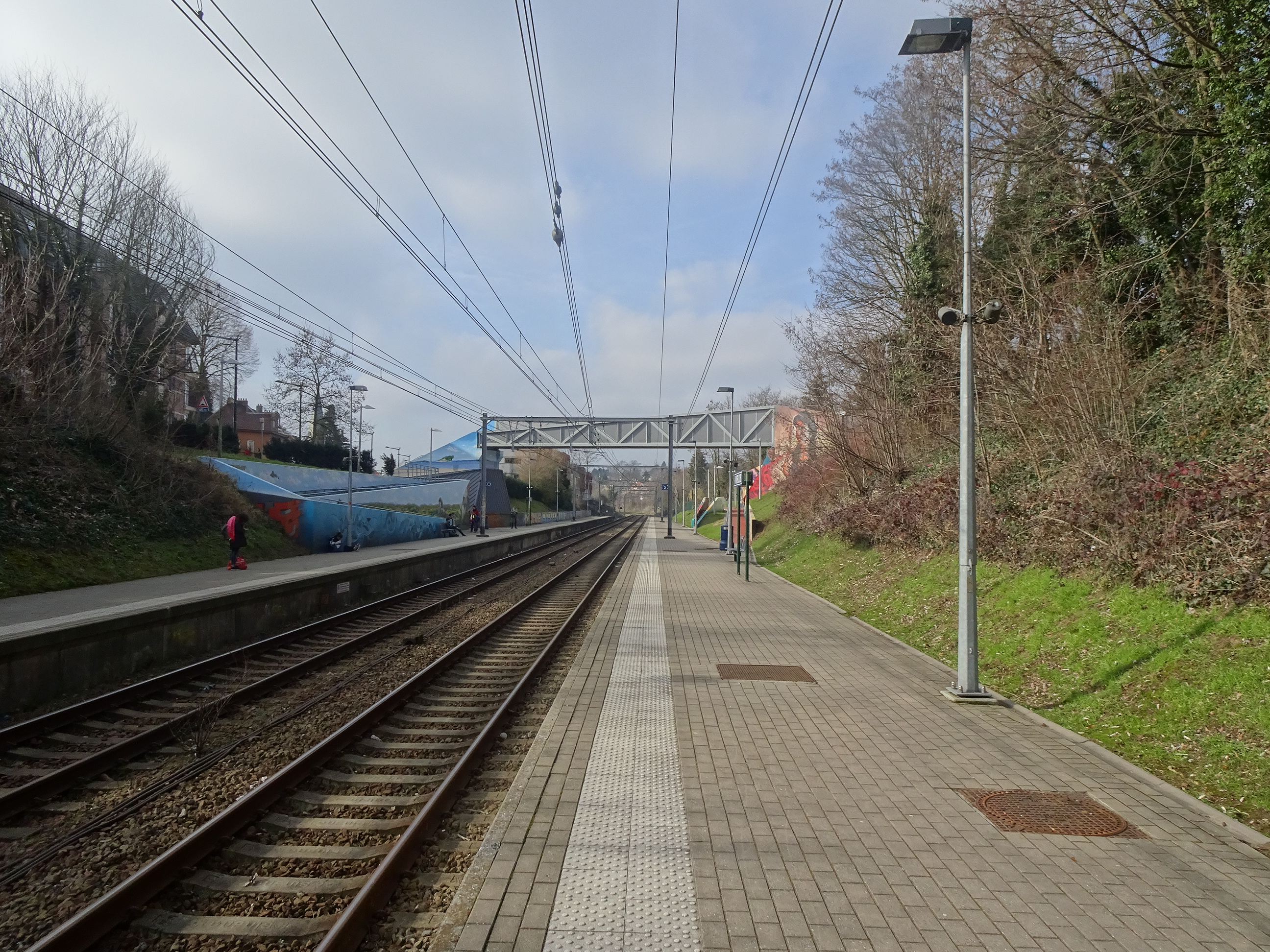 Quais de la gare de Vivier d'Oie - Février 2019